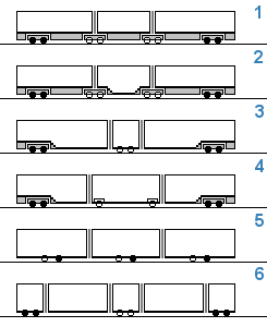 Schematische tekeningen van versch. lagevloertramtypen